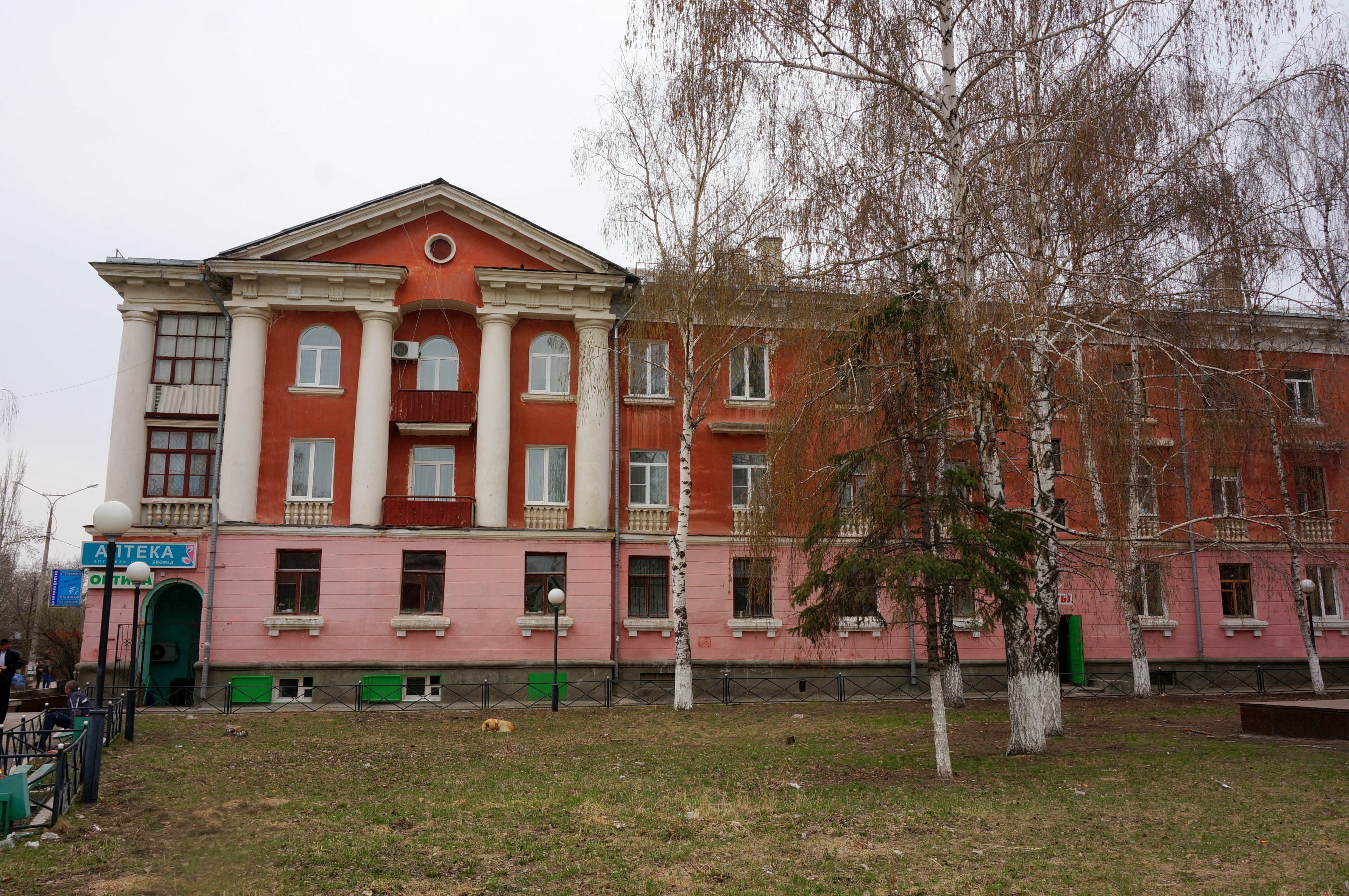 Здание по адресу Никонова 14-16 проектировалось в 1953 году. Авторы проекта сотрудники института «Ленгипрогор» Илья Георгиевич Ромм и Мария Александровна Самохвалова. Застройщиком являлась дирекция строительства порта и судоремзавода. Здание построено в 1957 году как общежитие на 150 мест. Фасад бокового крыла, выходящий на площадь Никонова